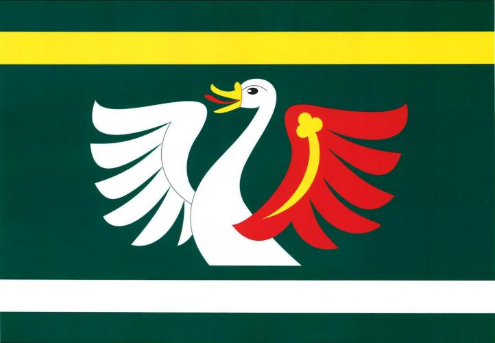 vlajka obce Petrovice II